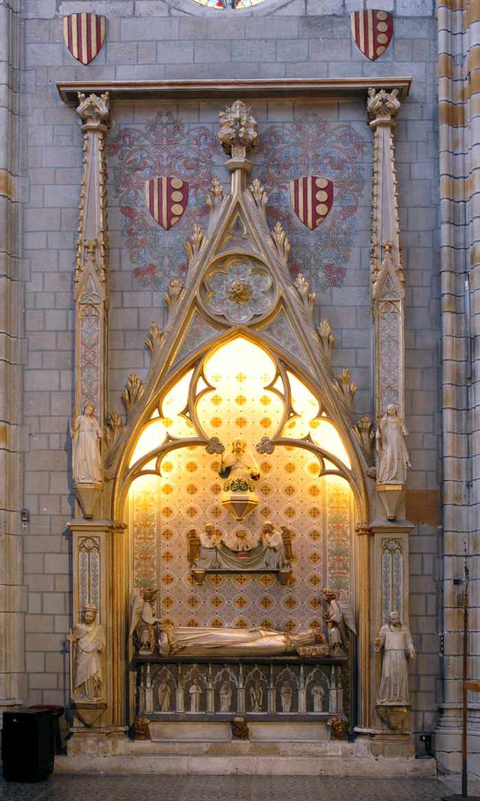 Tomba de la reina Elisenda de Montcada (monestir de Pedralbes, Barcelona)